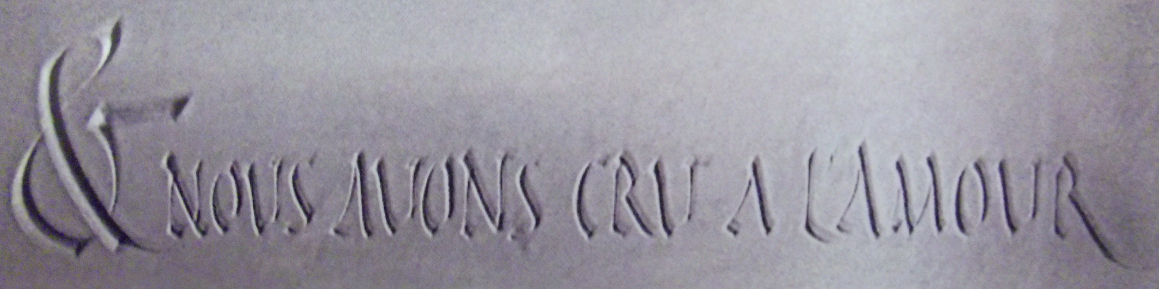 Devise de Mgr Hermil gravée dans la chapelle de l'évêché de Viviers